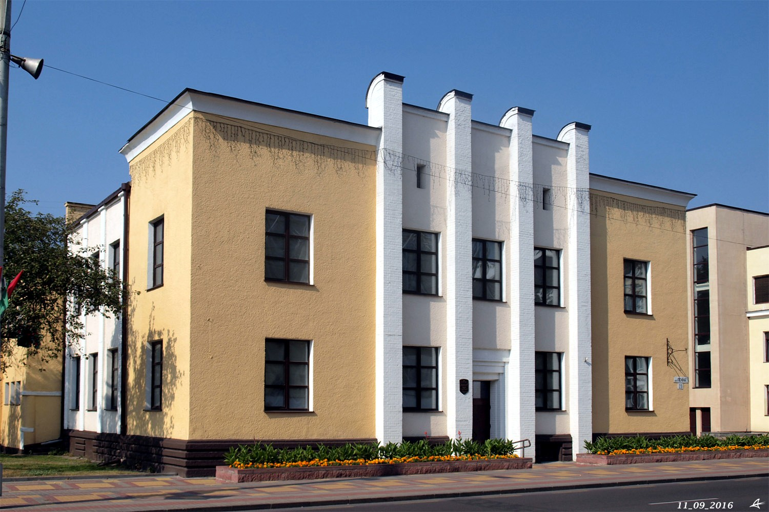 Брэст. Вуліца Леніна, 23